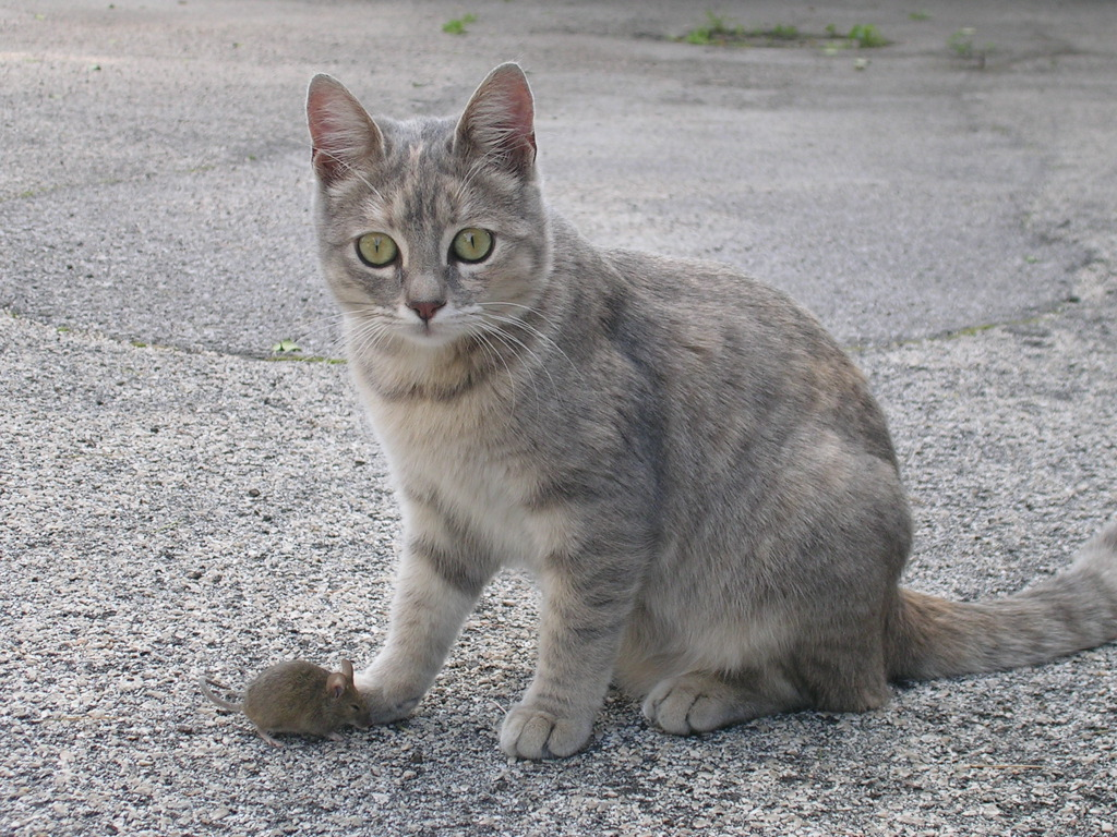 Cat and mouseIl Gatto e il Topo 2